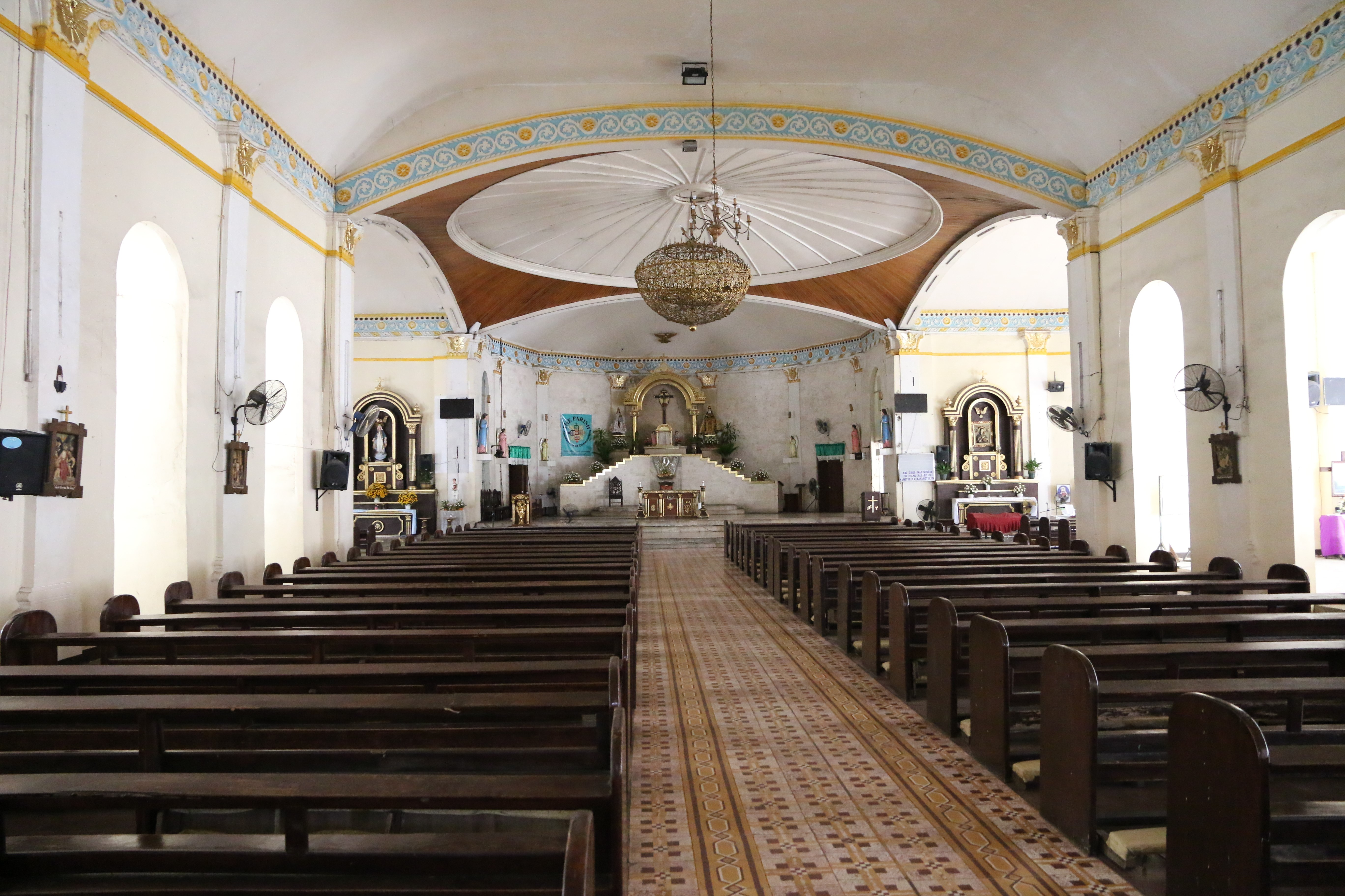 saint teresas church of talisay oldest church